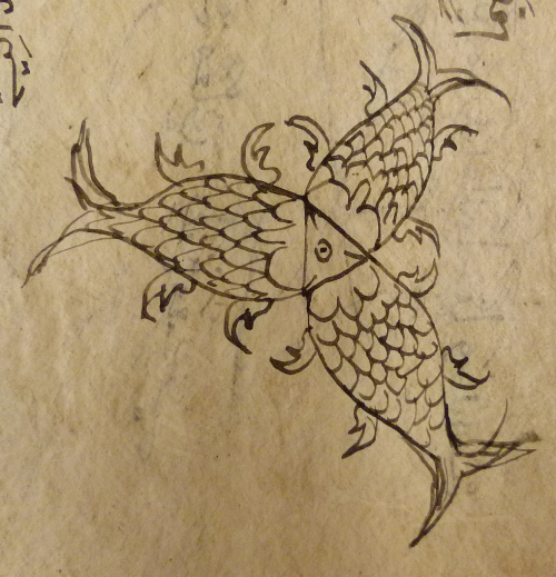 Ragam hias tiga ikan satu kepala, trimina dari British Library, MSS Jav 77, f. 16v